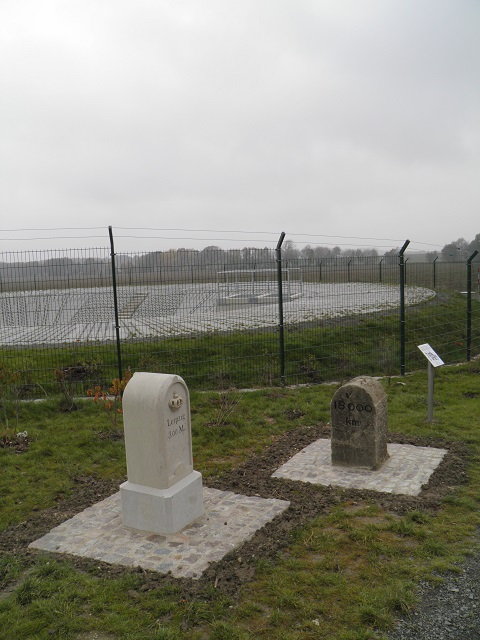 Königlich-sächsischer Ganzmeilenstein und Chausseekilometerstein Grethen S38